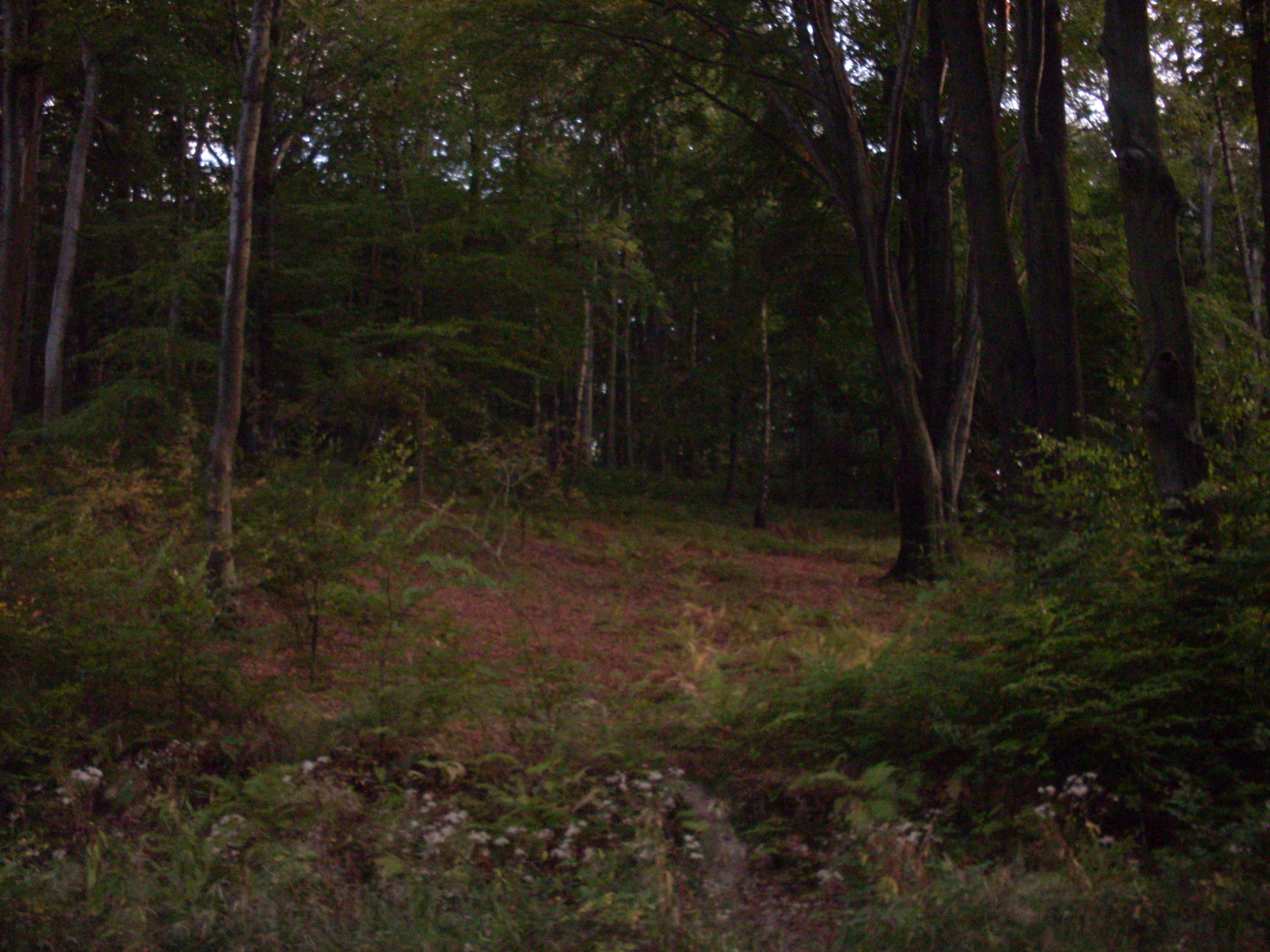 Góra Porąbki (Grzbiet Tenczyński) tzw. Polana Konwencji